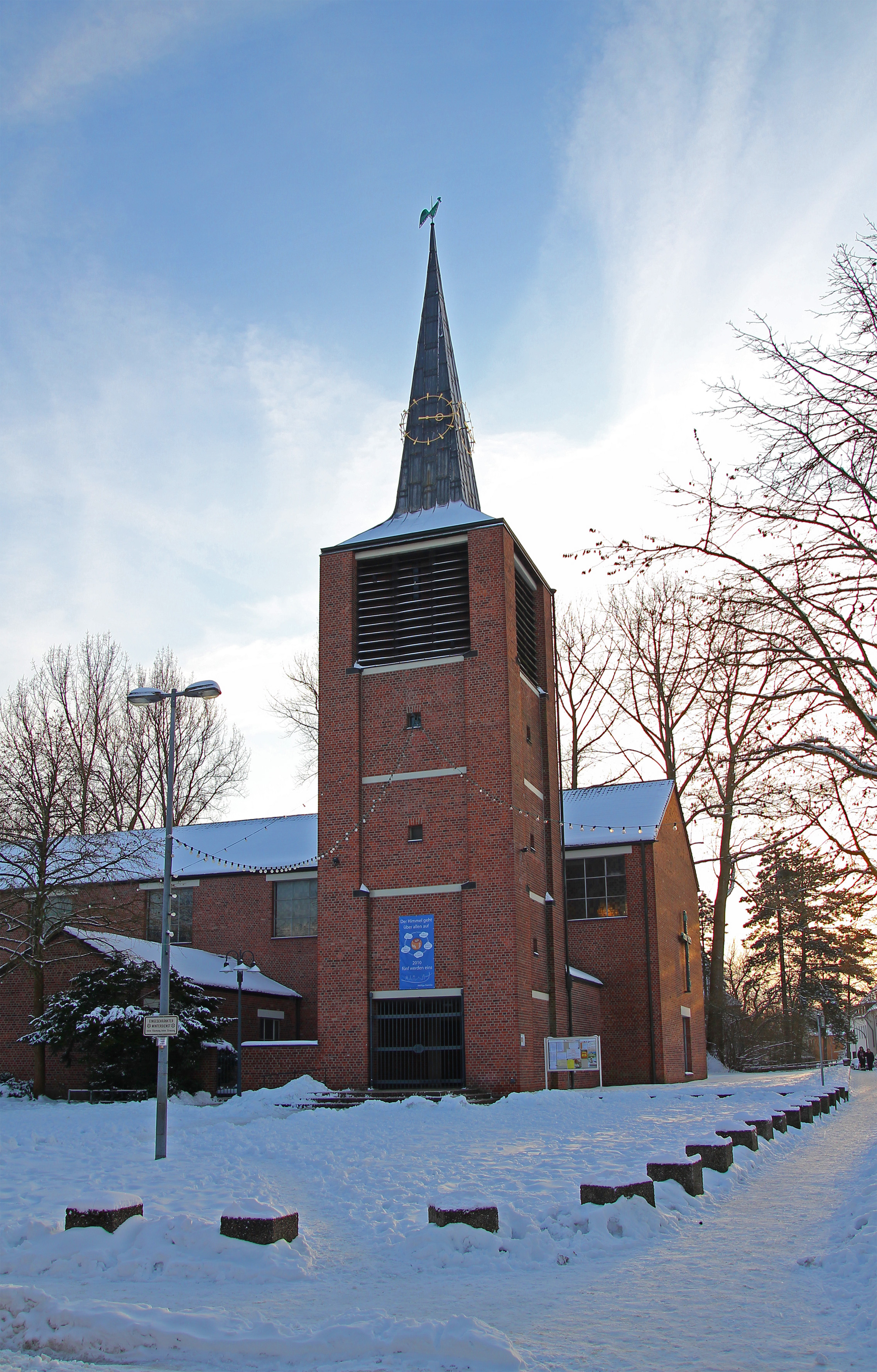 Weiße Weihnachten 2010 in Köln-Dünnwald. Katholische Pfarrkirche St. Hermann-Josef.